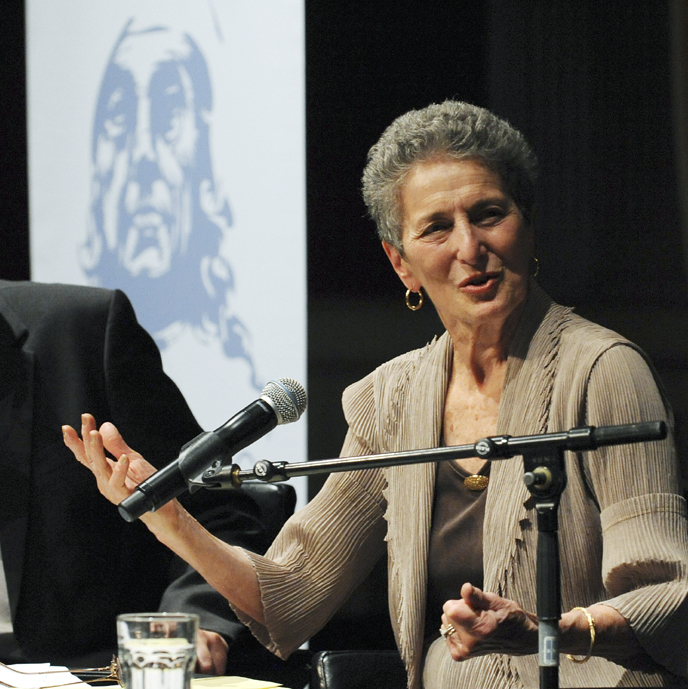 Holbergpris vinner Natalie Zemon Davis møter Jo Strømgren, tv. Erling S. Sandmo.. Foto: Marit Hommedal/SCANPIX